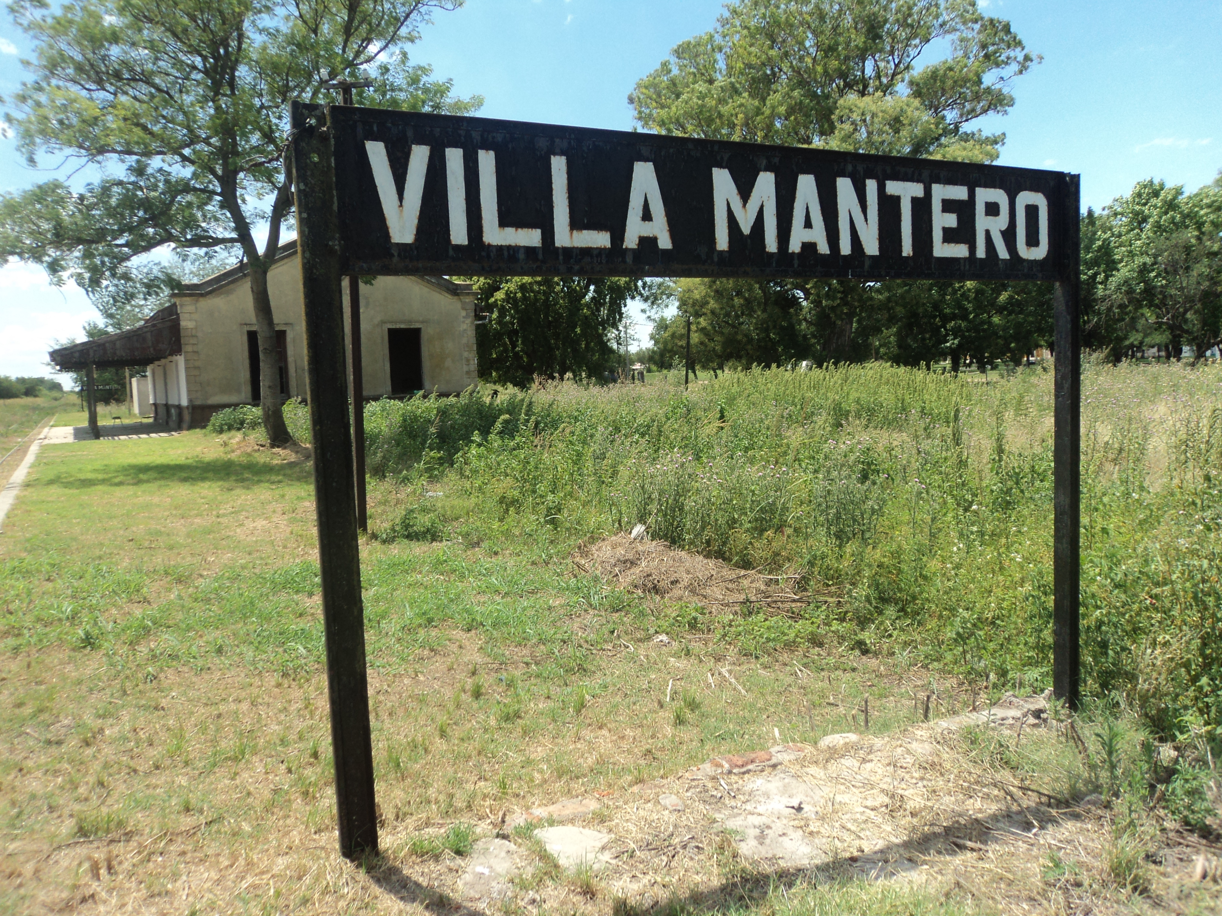 Estación de tren. Villa Mantero. Entre Rios. Argentina.